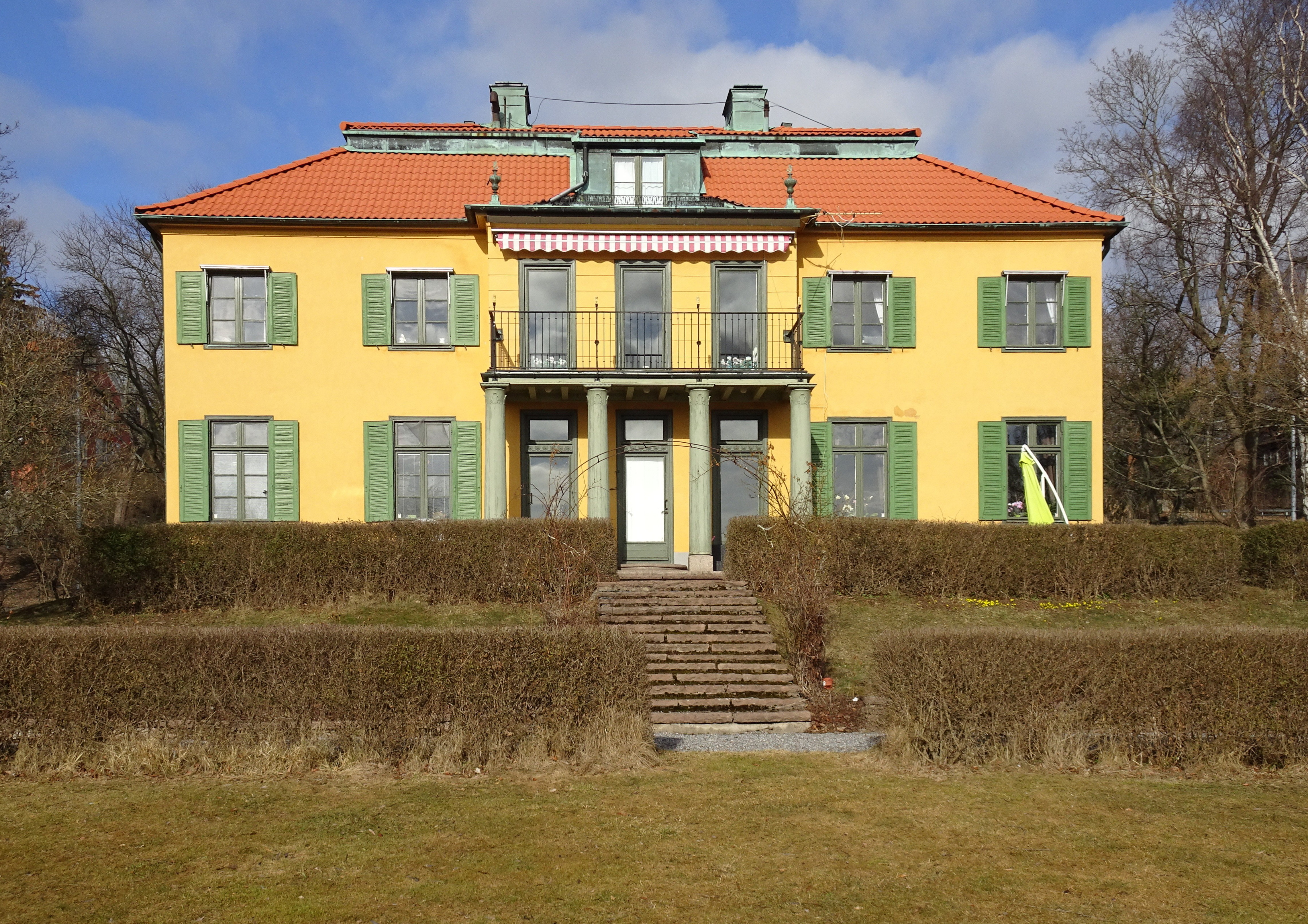 Lilla Rosenvik, Djurgården, Djurgårdsvägen 120, arkitekt Curt Björklund